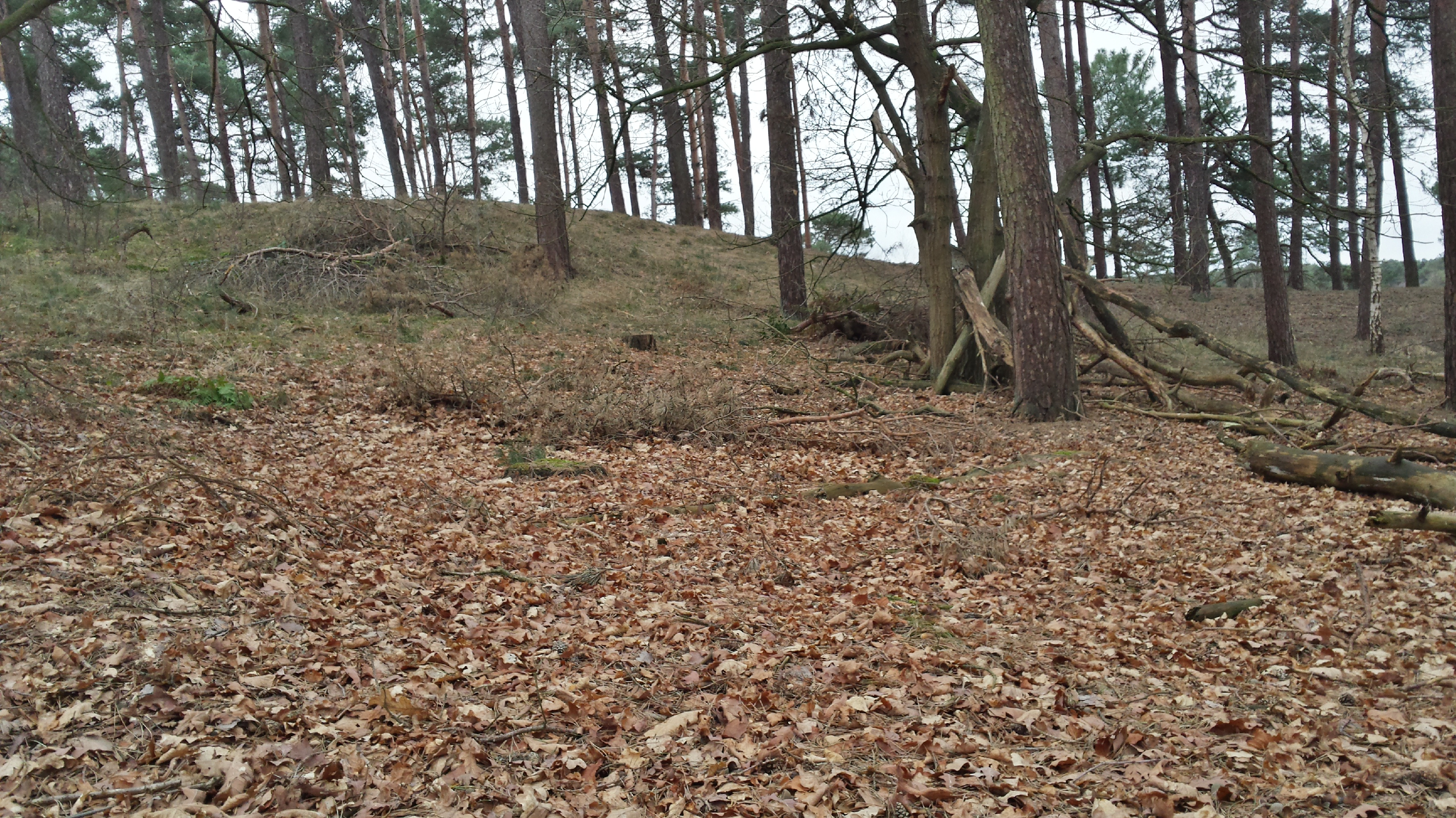 Hoogte verschil in de malpie bij Valkenswaard.